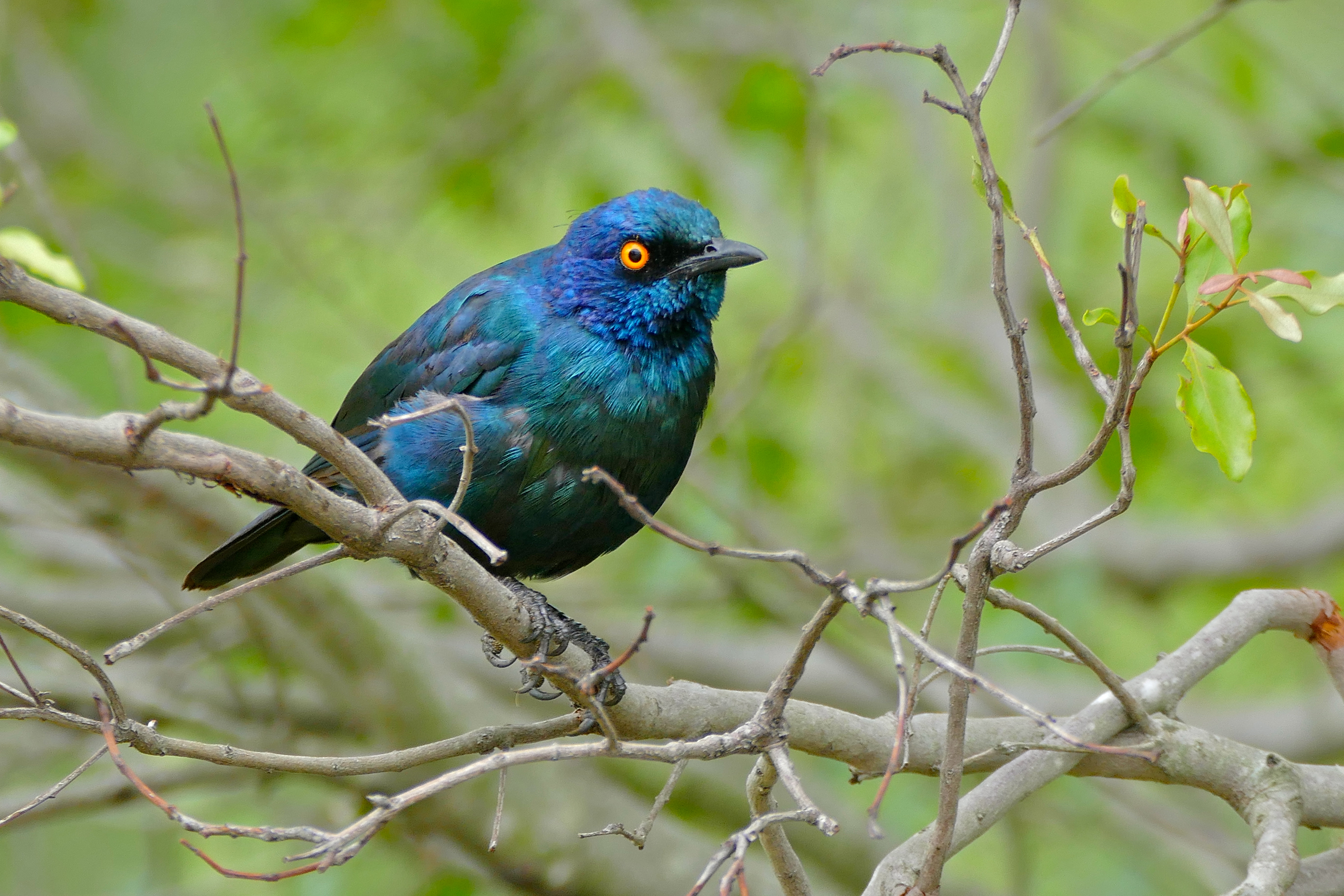 S121 Road East of Berg-en-Dal, Kruger NP, SOUTH AFRICA